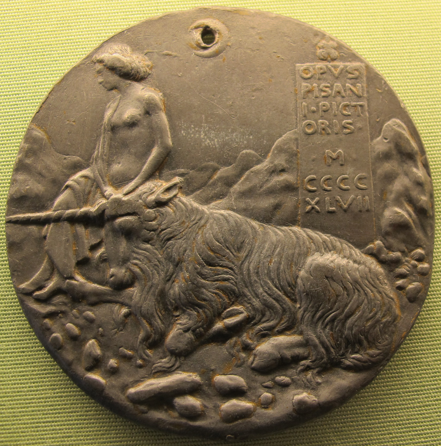 Pisanello, medaglia di cecilia gonzaga